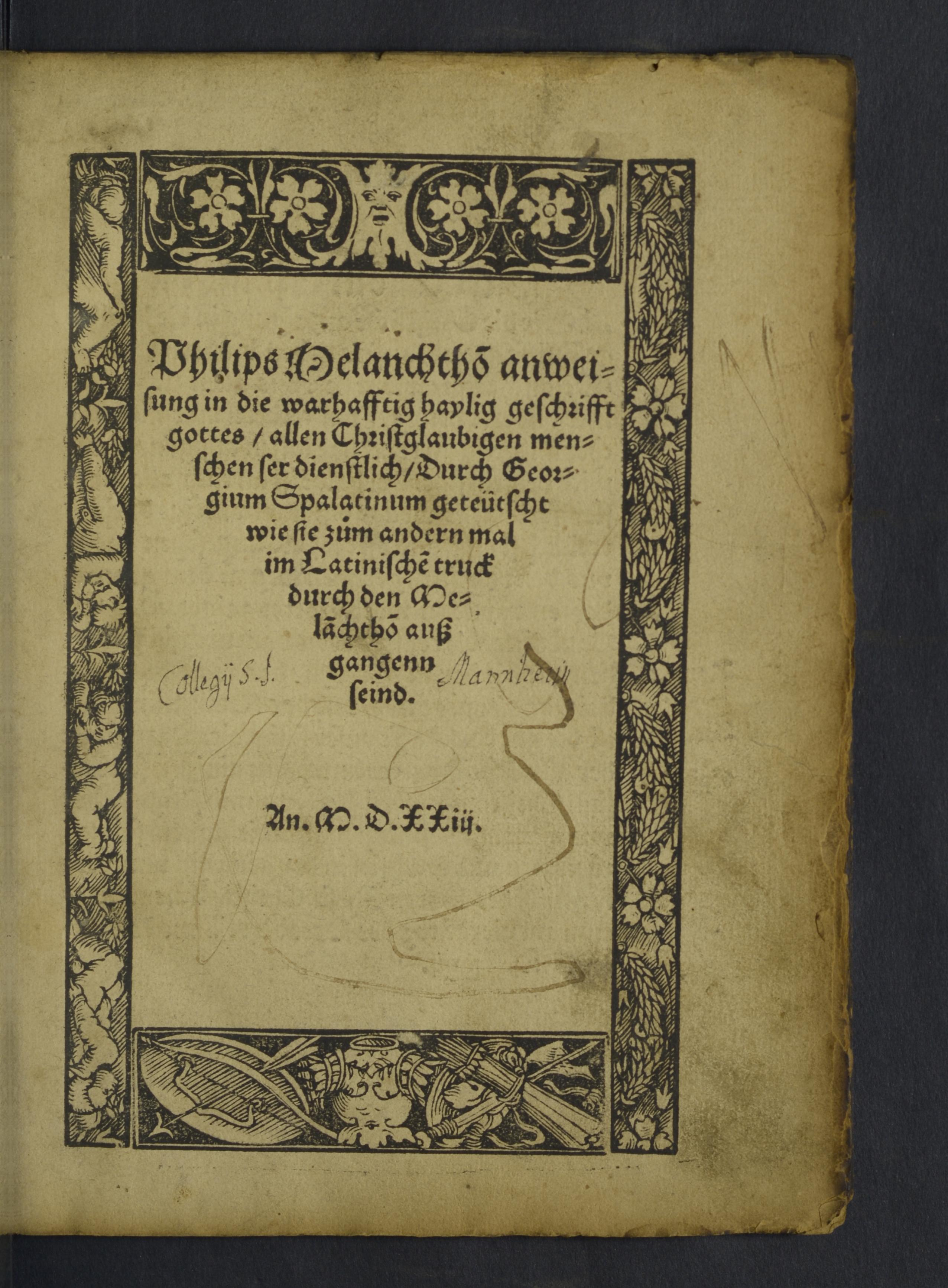 Titelseite von "Philips Melanchtho[n] anweisung in die warhafftig haylig geschrifft gottes, allen Christglaubigen menschen ser dienstlich". Aus dem historischen Bestand der Universitätsbibliothek Mannheim